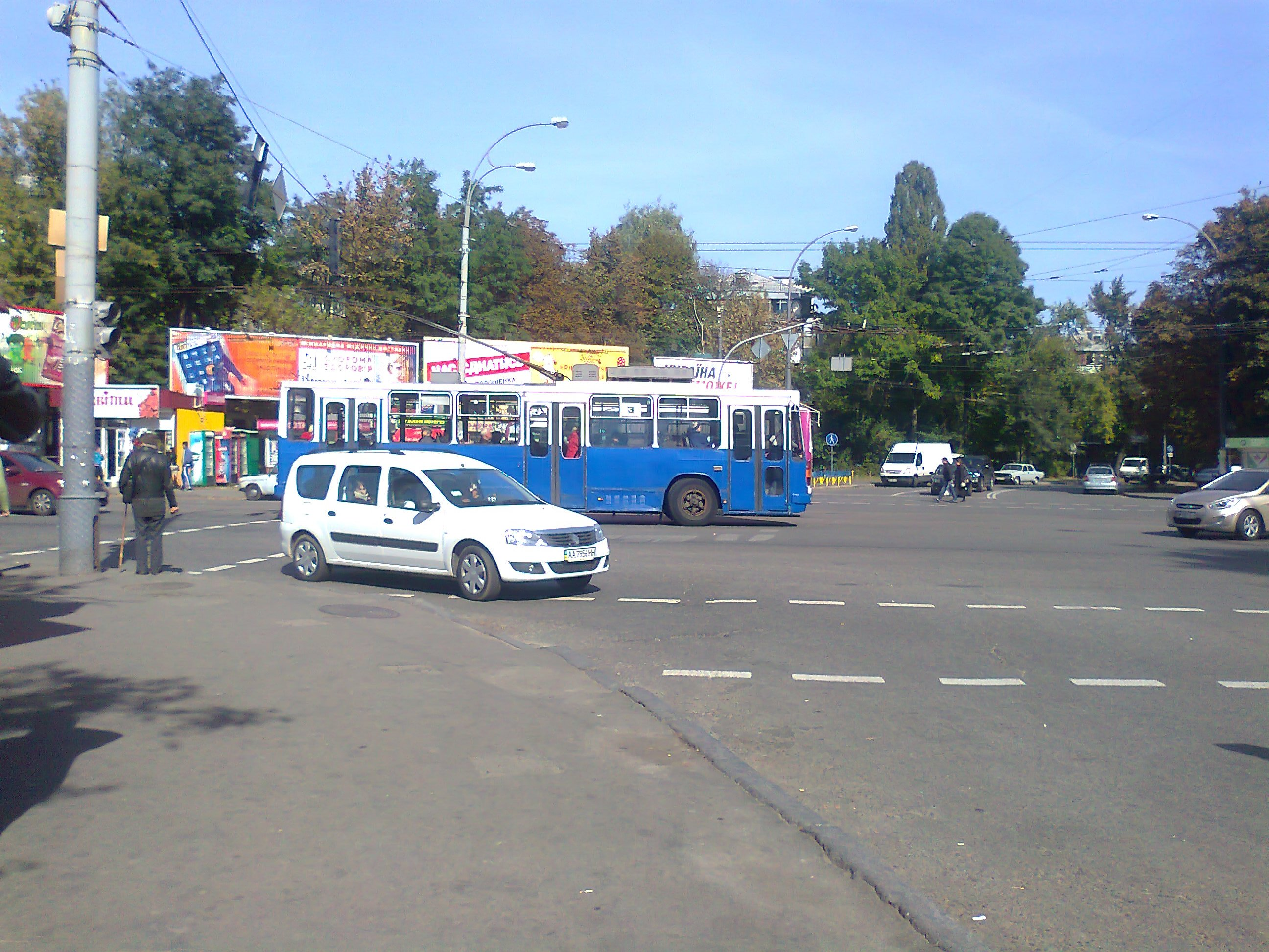 Тролейбус ЮМЗ-Т2 маршруту №3 повертає на вул. Волгоградську